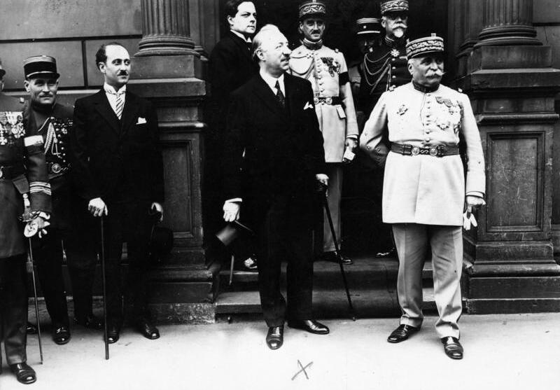 Oberbefehlshaber der Besatzungs-Armee General Guillaumat [l.] Zivil-Kommissar der französischen Besatzung Tirard [m.]